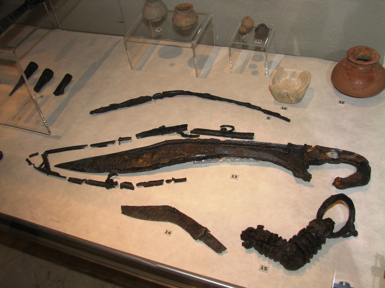 Falcata i altres elements ibèrics del Museu Arqueològic de Villena, al voltant del segle IV a.C.